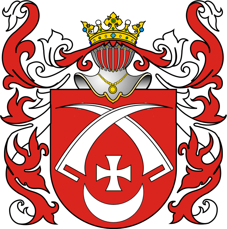 Герб шляхетський Бибель